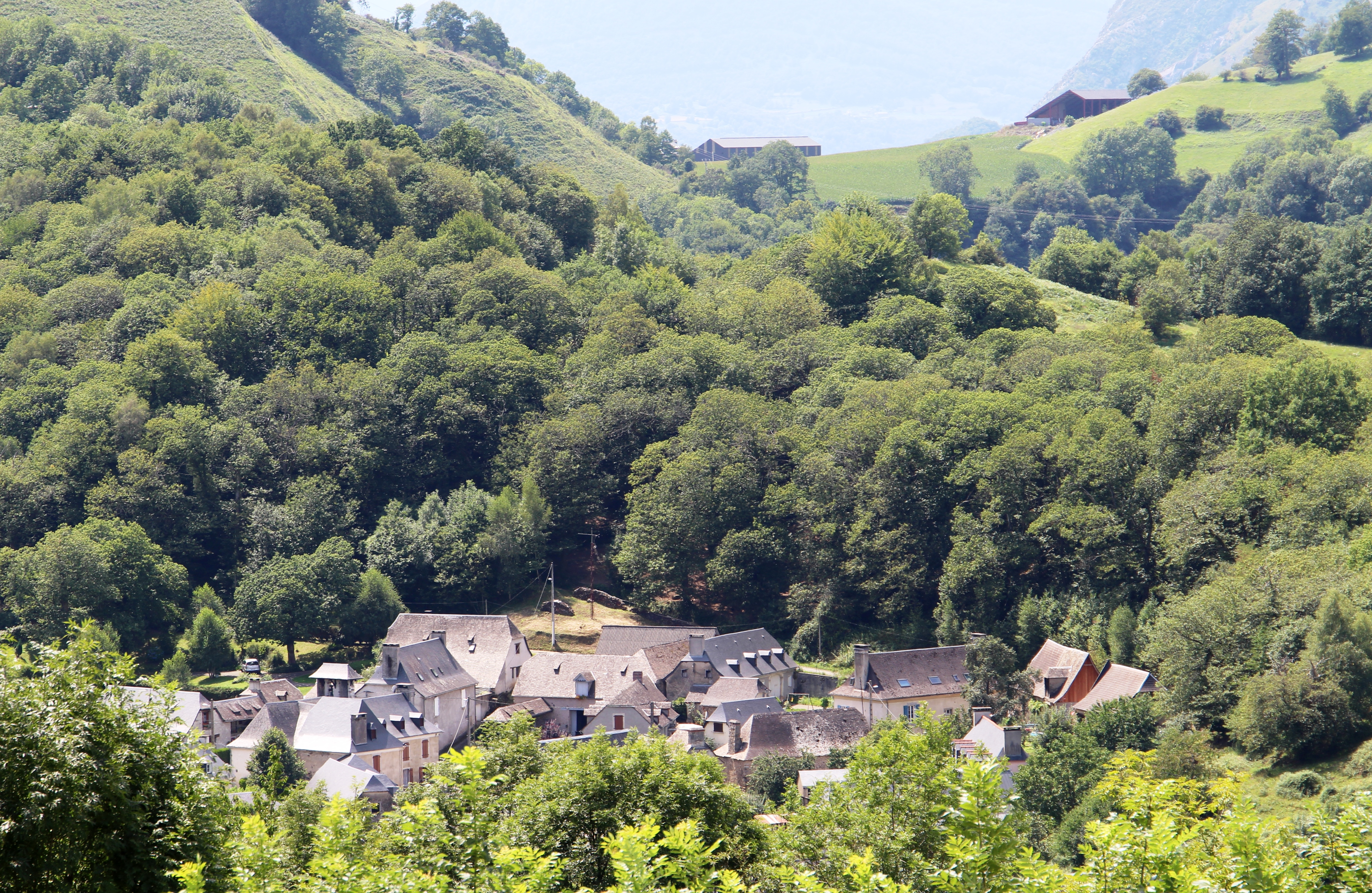 Jarret (Hautes-Pyrénées)